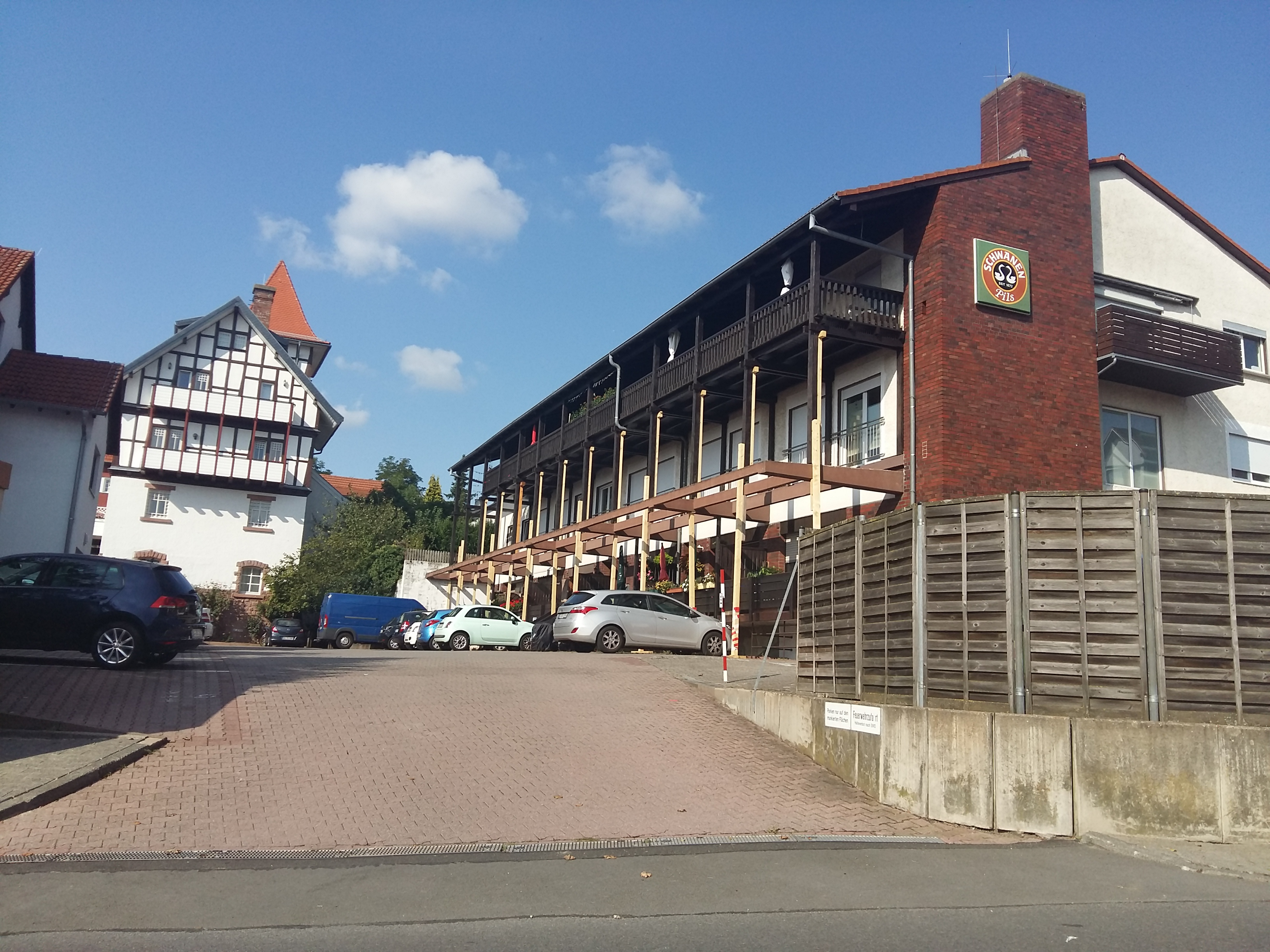 Gebäude der ehemalige Schwanenbrauerei in Groß-Umstadt.